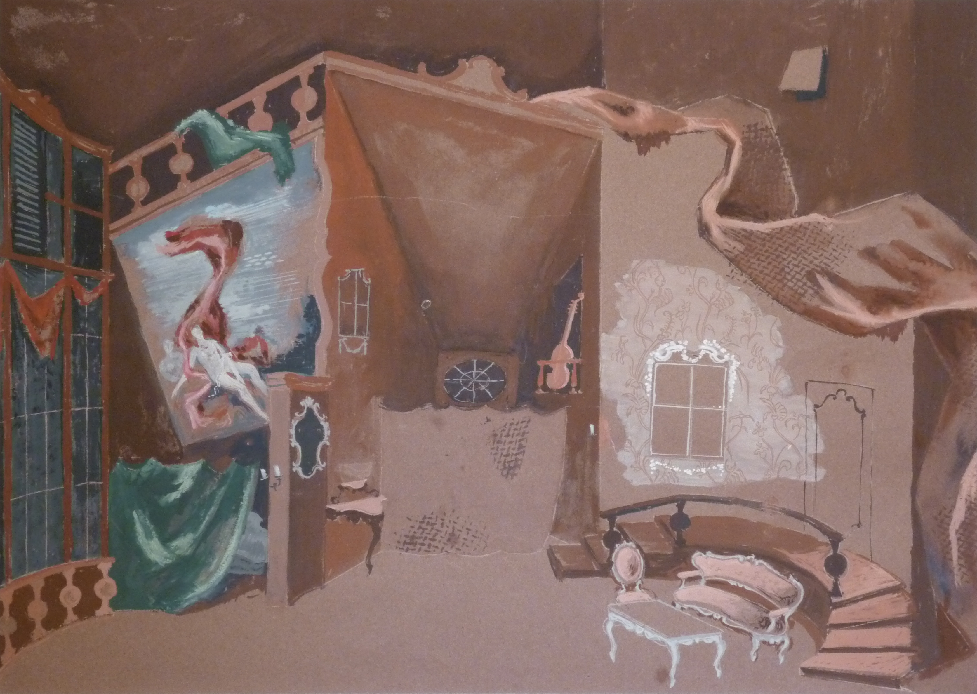 Bühnenbildentwurf von Helmut Jürgens für "Rosenkavalier" von R. Strauss, 3. Akt, Aufführung München 1962